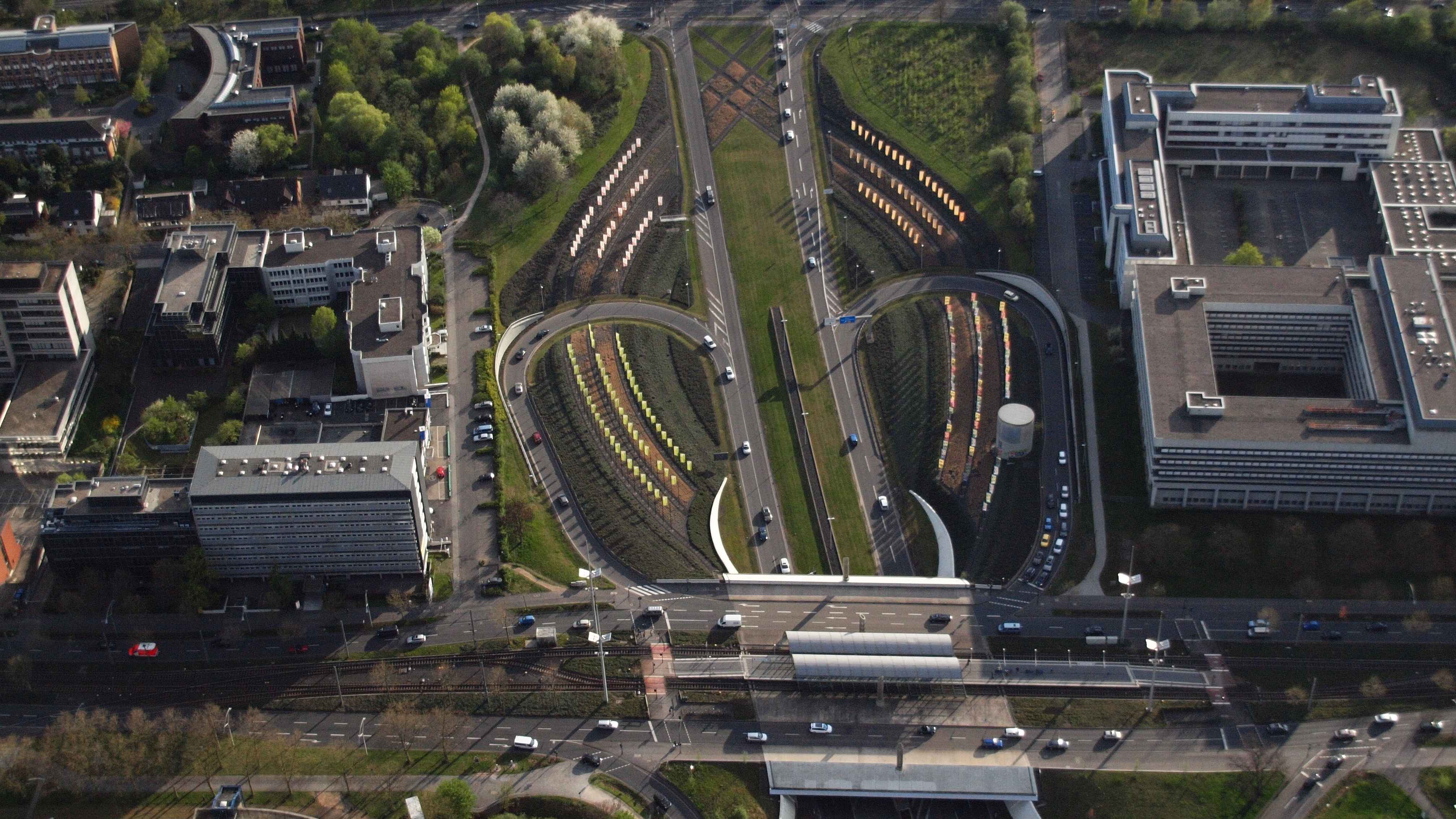 Kreuzung A562/B9, Bonn: Luftaufnahme